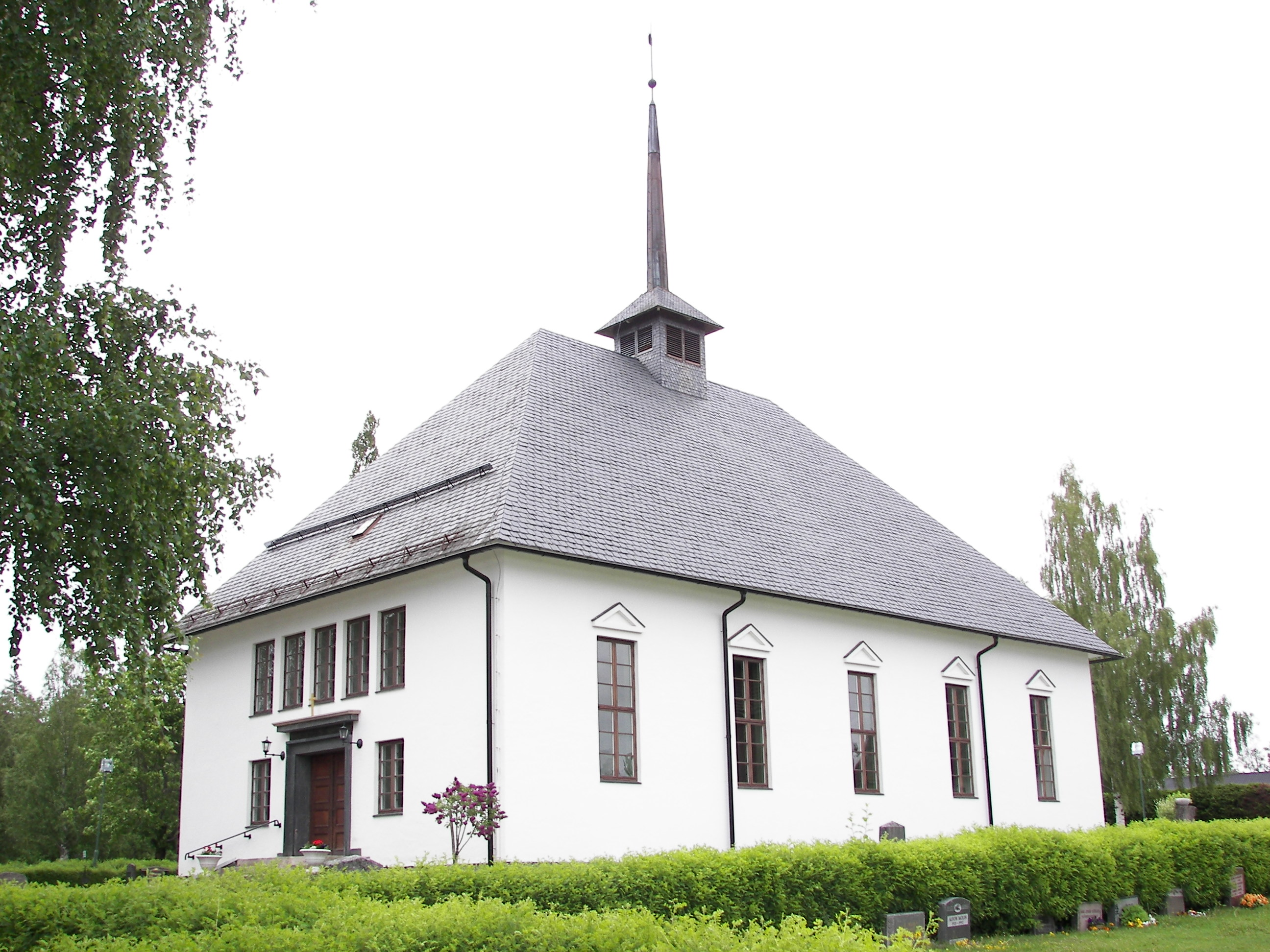 Torpshammars kyrka